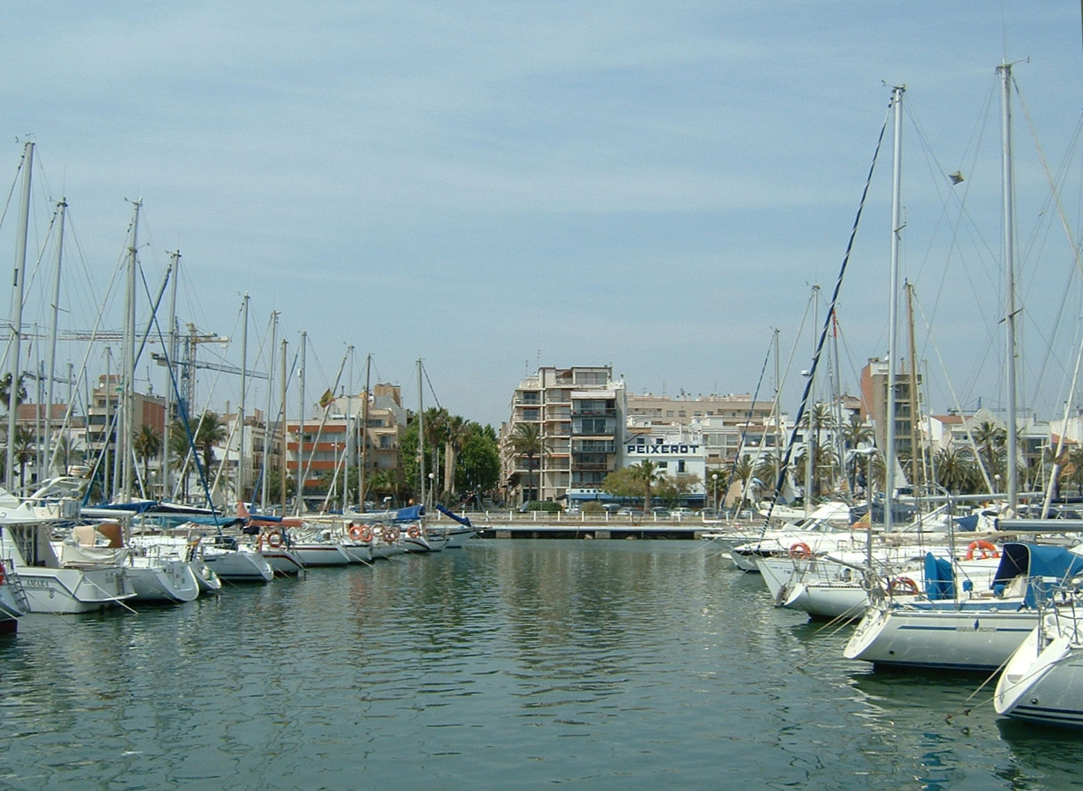 Harbor in Vilanova I la geltru, Catalonia, Spain